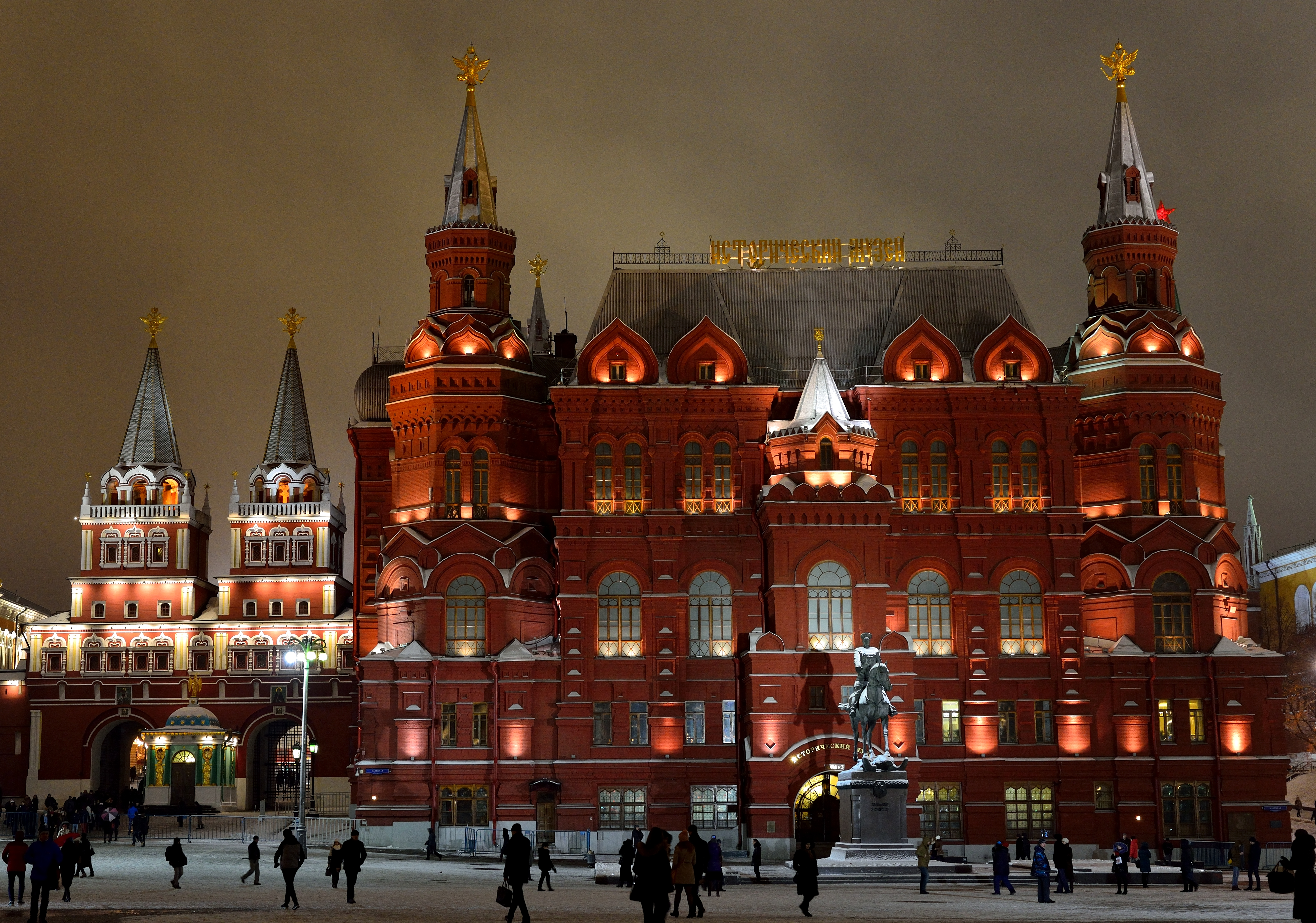 Исторический музей